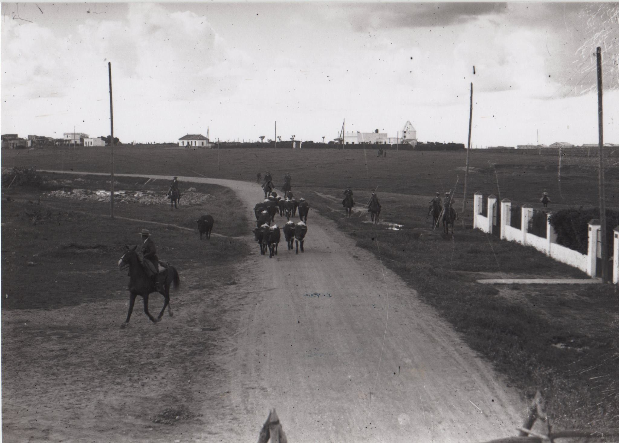 Esta foto, sacada del libro "Bellavista en imágenes", de Onofre Marín, corresponde a 1929. La vereda y los toros siguen igual que hace años, pero el Barrio ya se ve crecer poco a poco. La "Casa de la Cartera", la primera de Bellavista ya se ve un poco escondida por las otras viviendas y en el centro, esa casa del tejado de cuatro aguas era de Pepe el Vinatero, estaba situada en una de las esquinas que forman las calles Viar y Feliciana Enríquez. Junto a esa casa se ve lo que años después denominamos en Bellavista el "Chalet de los Americanos". La foto está realizada delante exactamente de lo que hoy ocupa el bloque de viviendas llamado "Antequera". Resulta curioso apreciar como el silo del Cortijo está encalado.